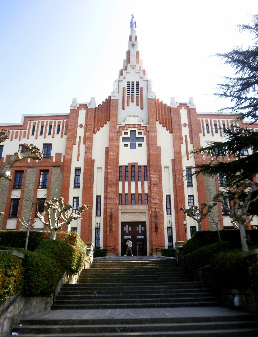 Iglesia de la Milagrosa (PP Paúles), Pamplona